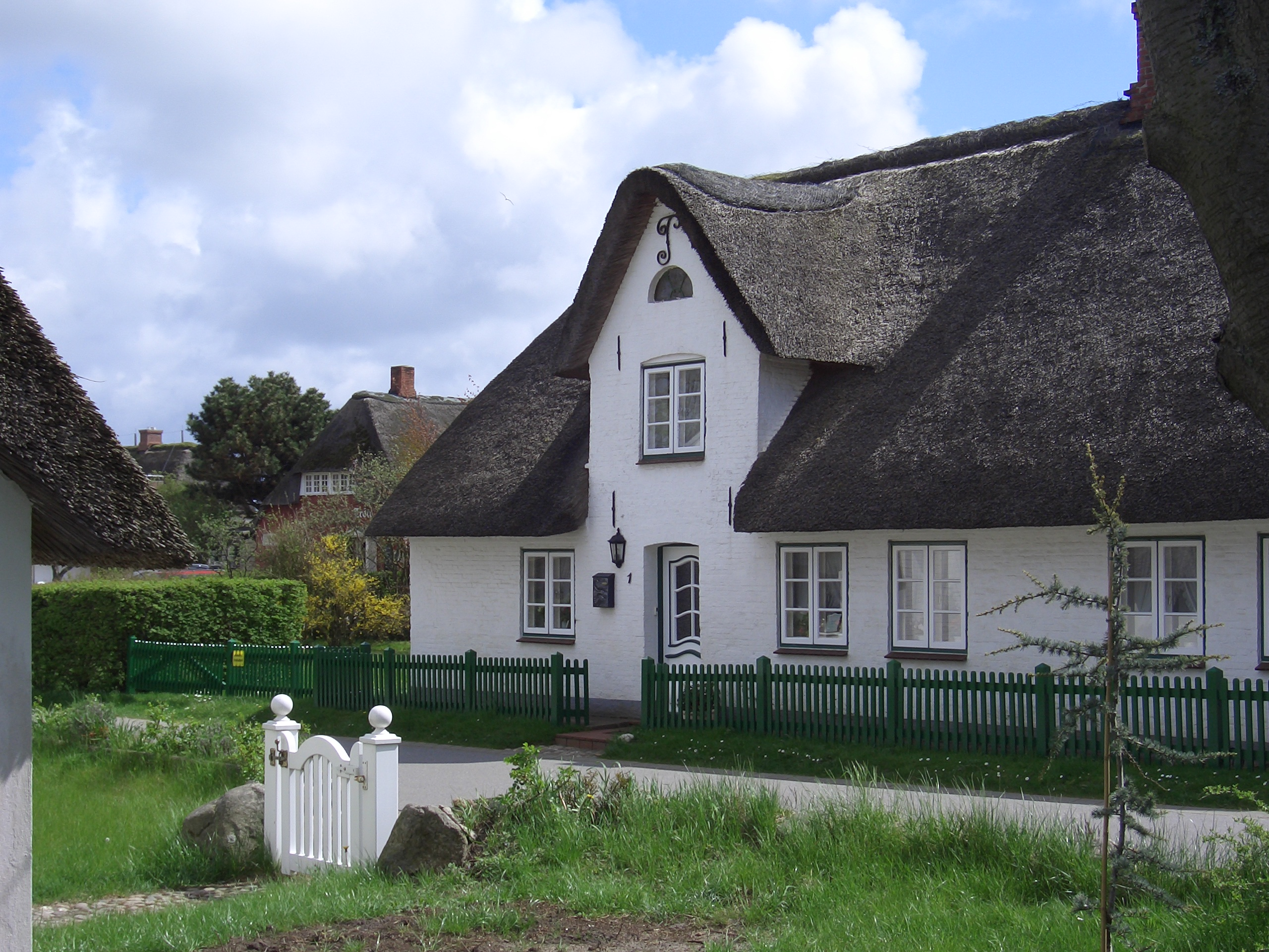 Typisches Haus in Nebel/Amrum